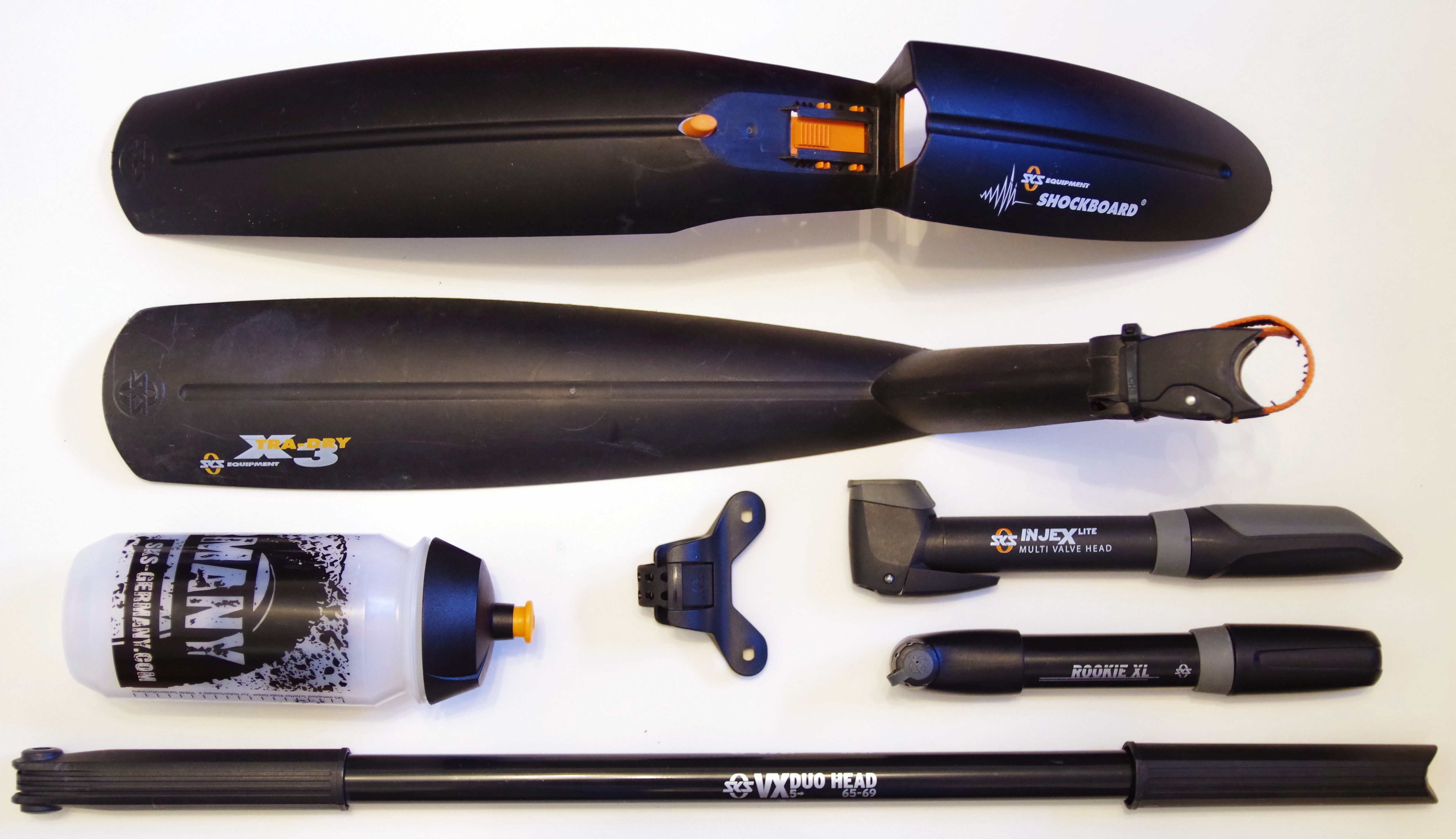 Products of SKS Germany: Mudguards, Bicycle Pumps, Bottles